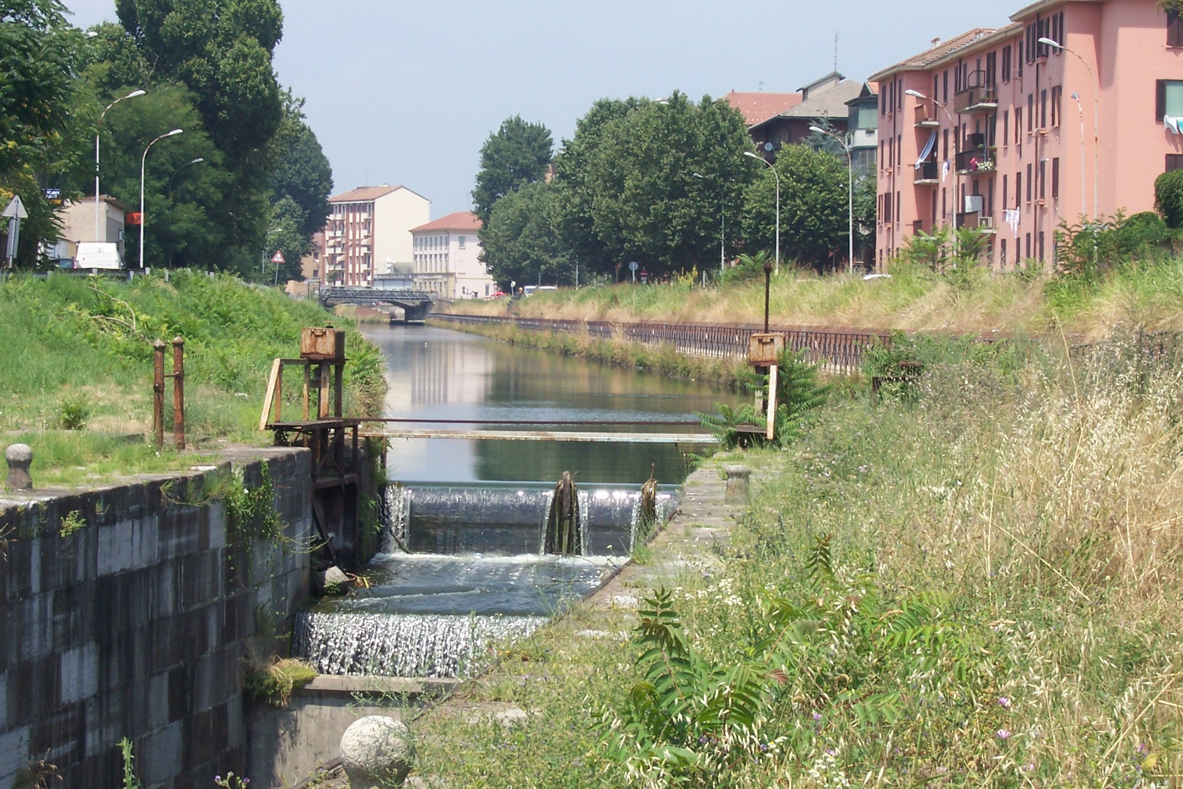 Vèneto: Pavia, la prima delle conche della " verso Scalinata Il Ticino. Non essendoci Più la Funzione irrigua , solo esiste Il Bacino di Navigazione .